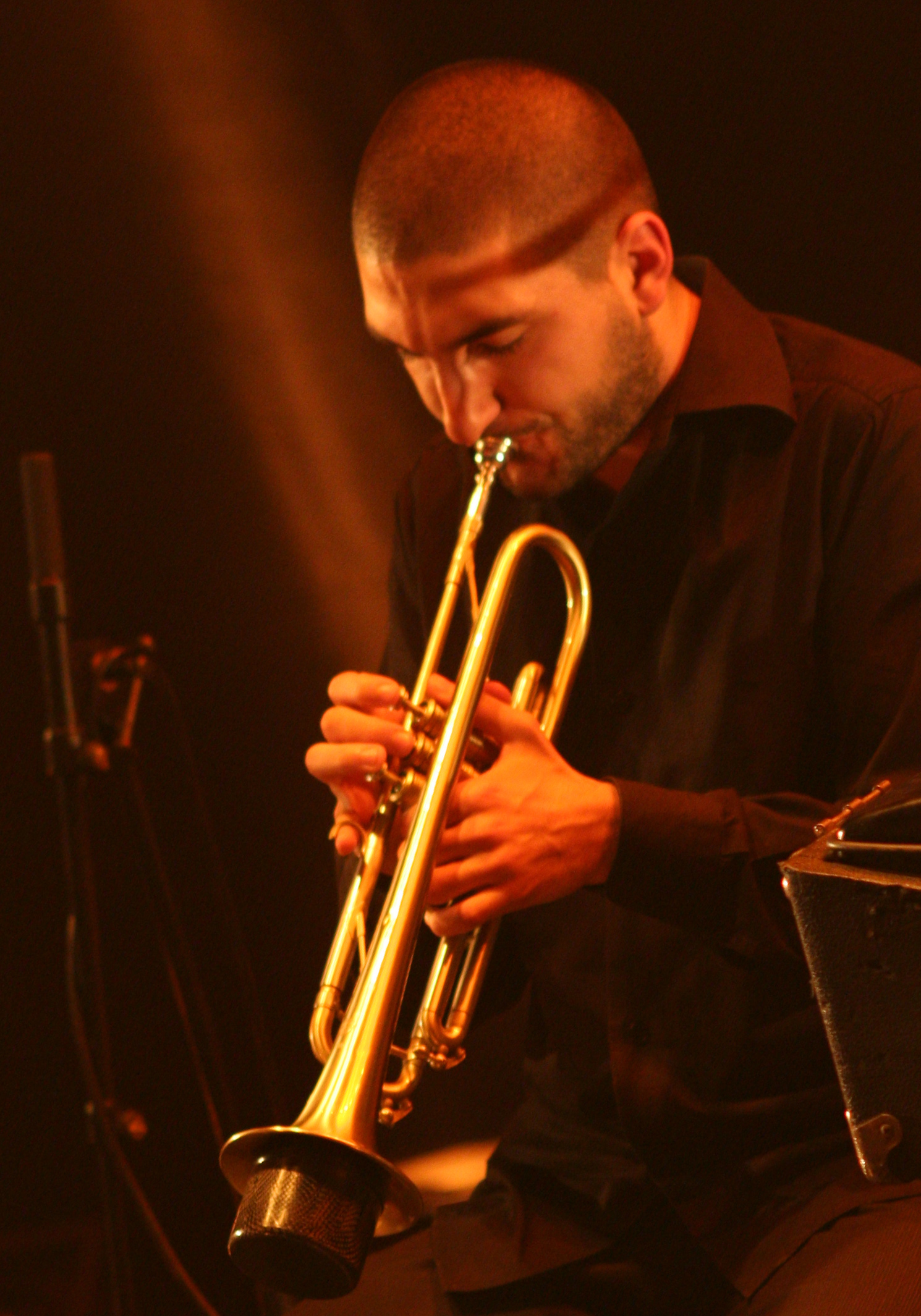 Ibrahim Maalouf en 2006